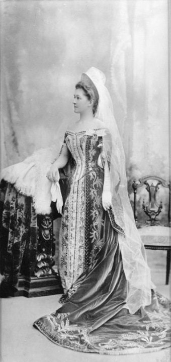 Наталья Алексеевна Челищева (1870—1954), в замужестве Приклонская